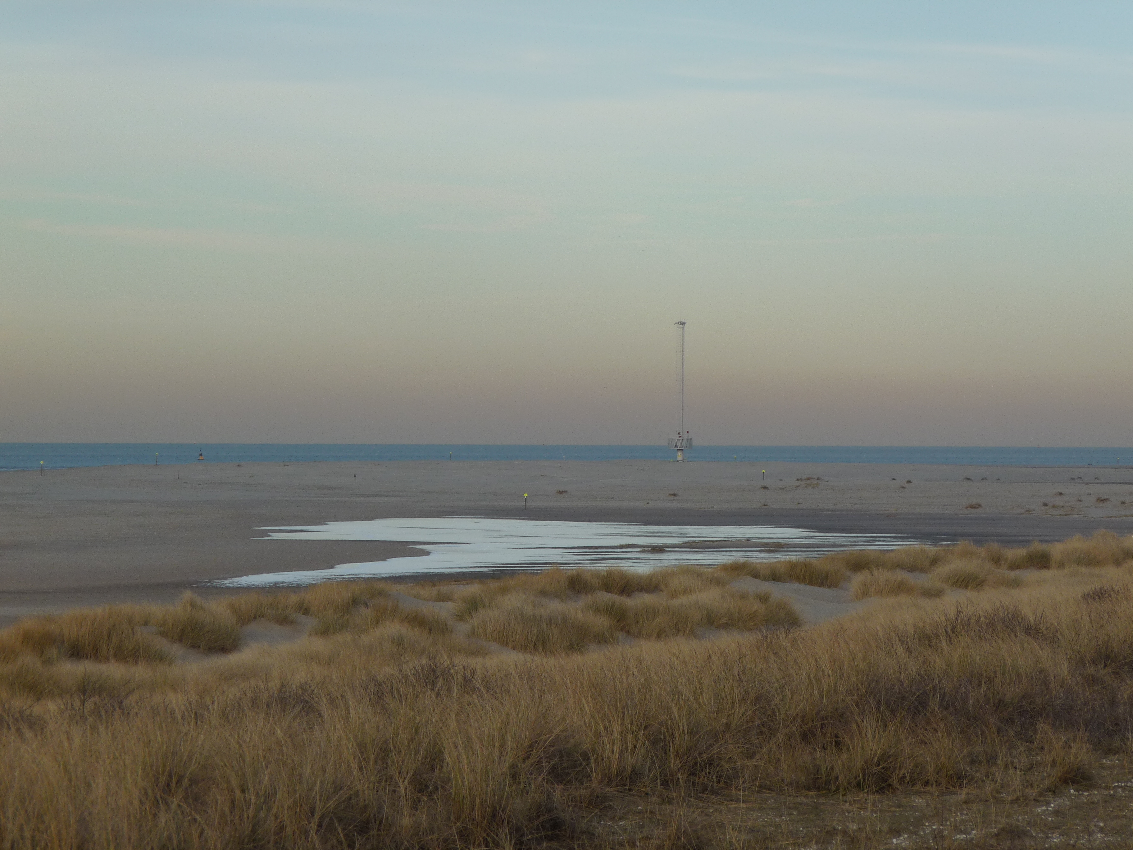 Een meertje die is ontstaan aan de zuidkant van de Zandmotor door afzetting aan de zeezijde. De stroom buigt hier naar het westen af.